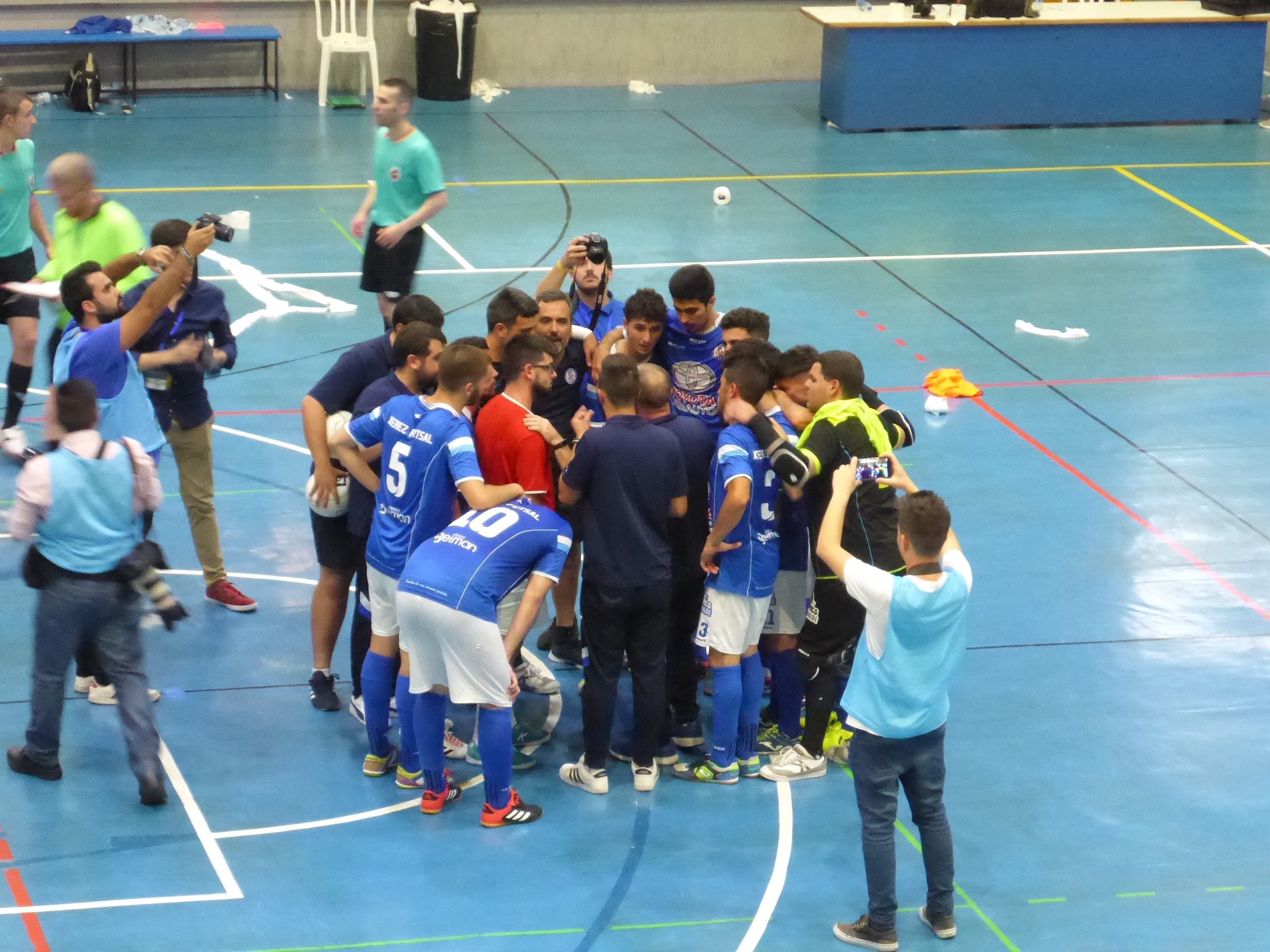 Partido de vuelta de la promoción de ascenso a Segunda División de Fútbol Sala Española entra Xerez DFC y Talavera (Jerez de la Frontera)